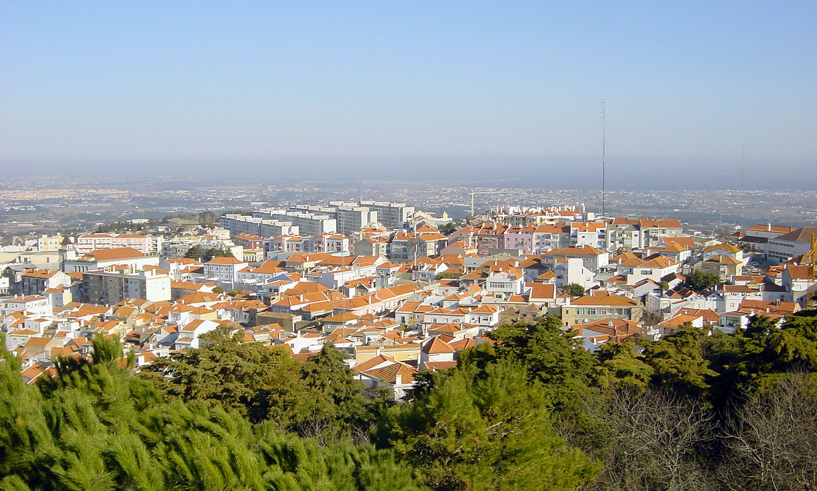 Description